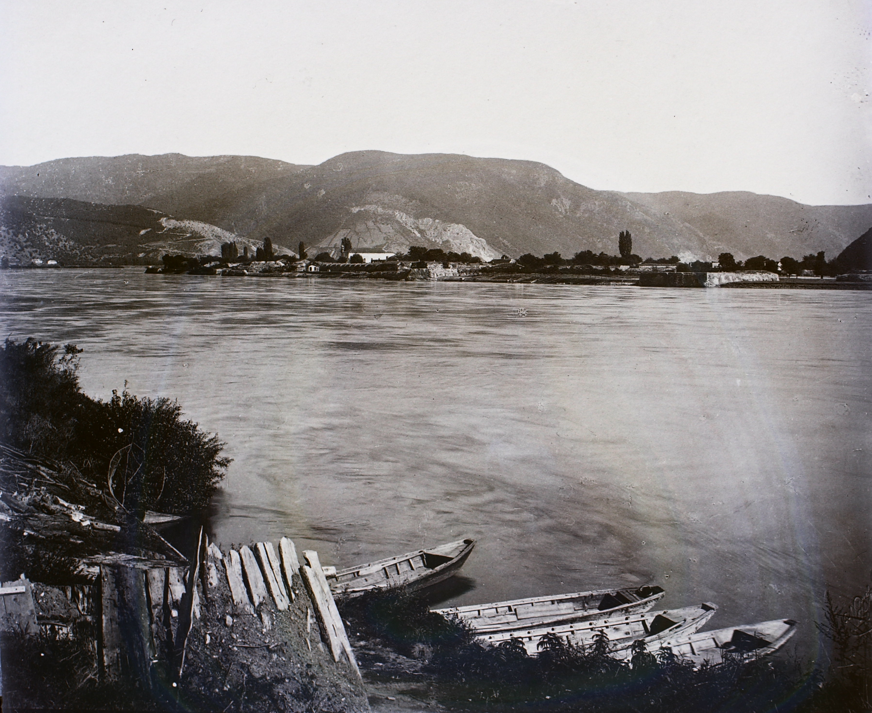 Duna, Vaskapu-szoros. Location: Romania, Ada Kaleh Tags: Danube, ship, island Title: Duna, Vaskapu-szoros.